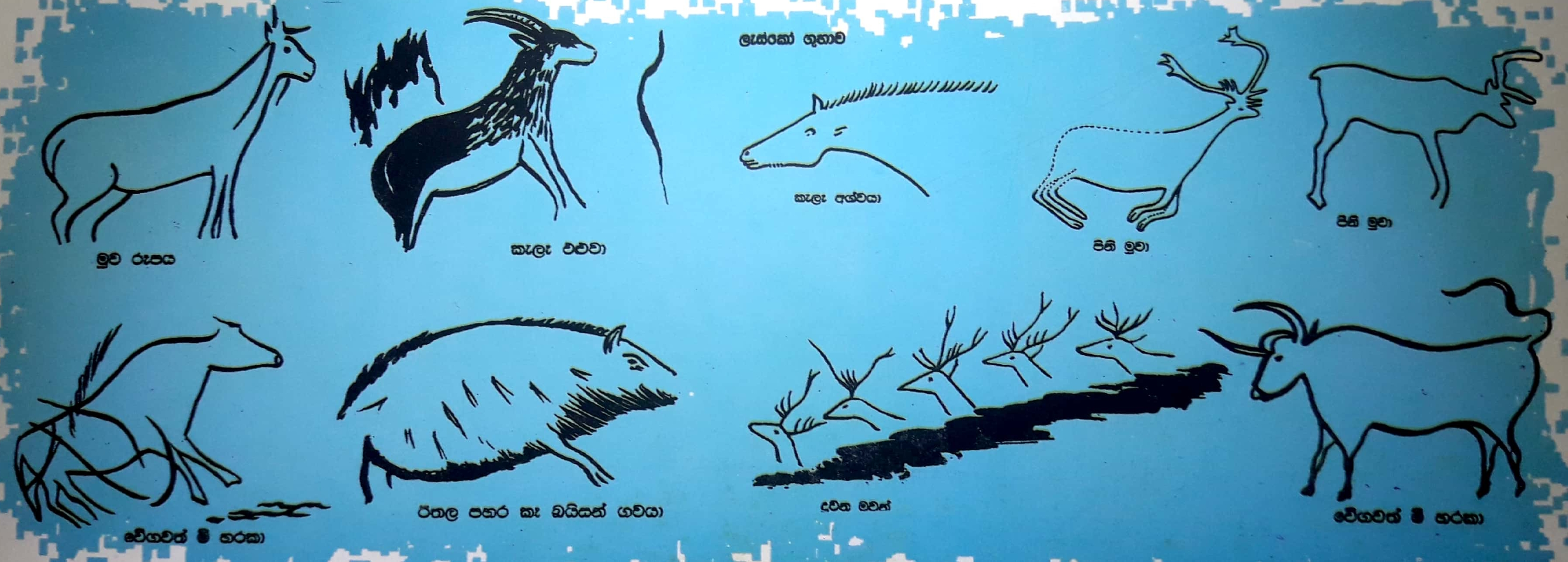 සිංහල: ගුහා සිතුවම්